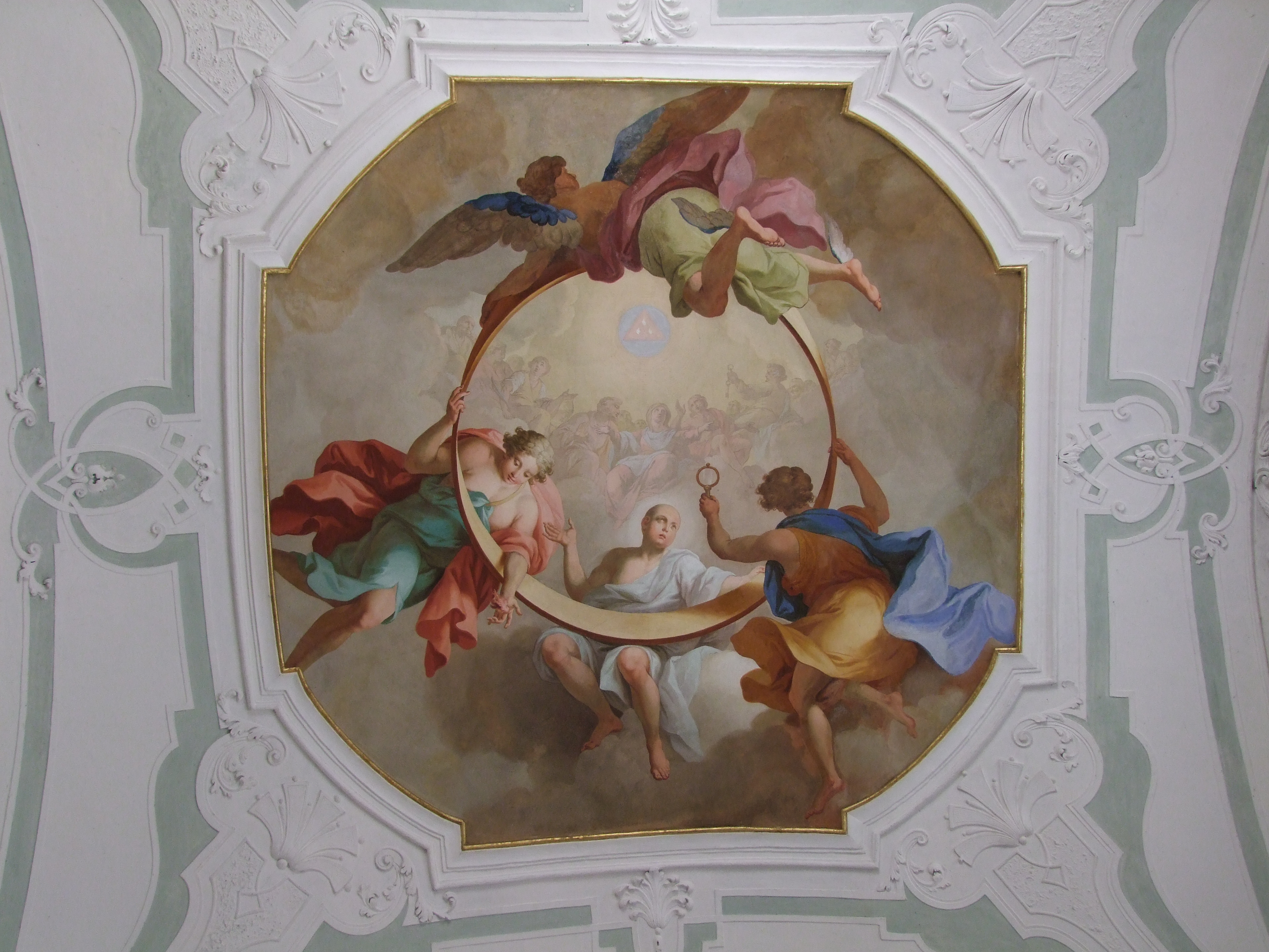 St. Georg, ehemalige Klosterkirche des oberschwäbischen Klosters Ochsenhausen